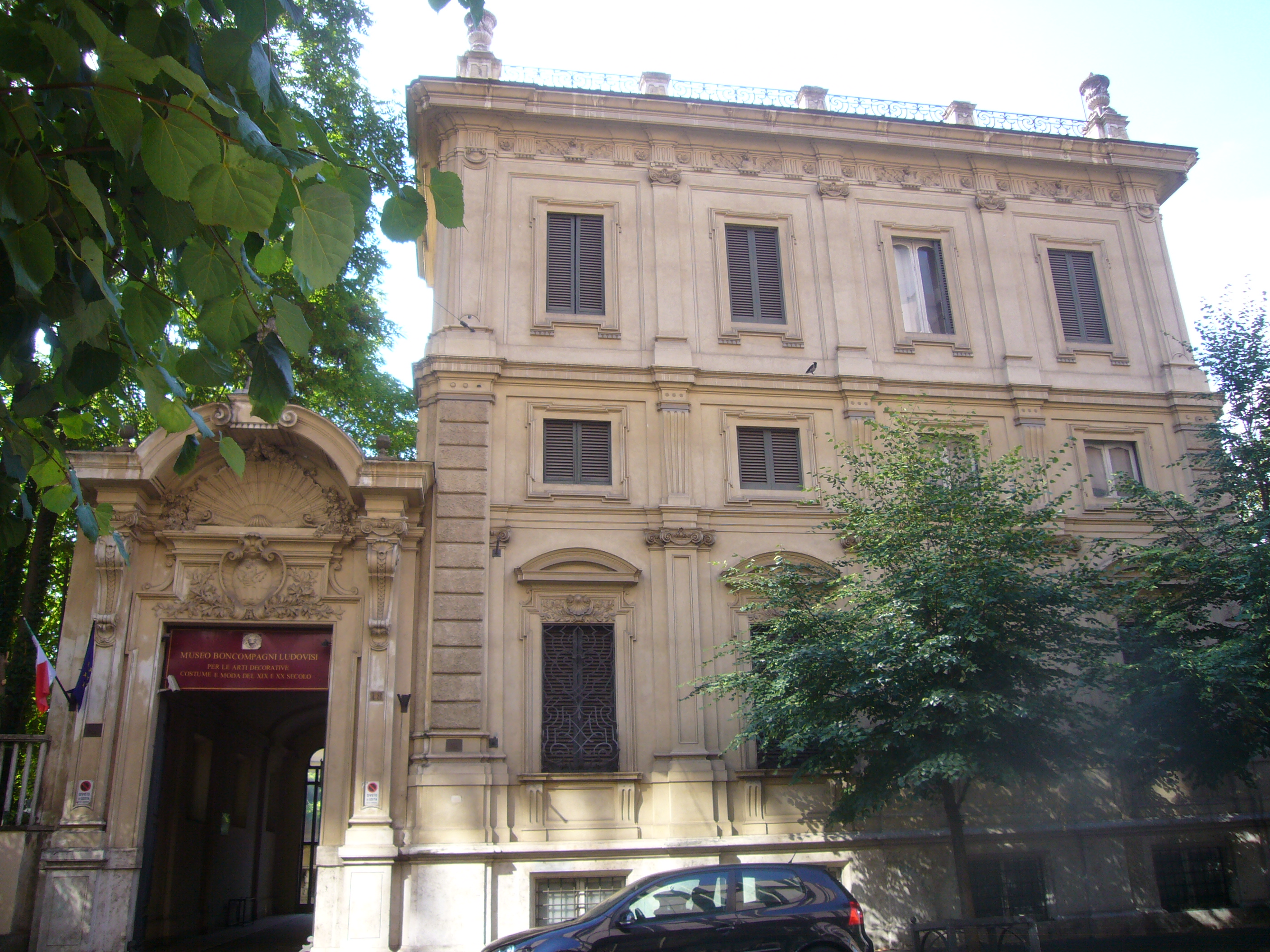 Roma, via Boncompagni. Villino Boncompagni Ludovisi e ingresso al Museo per le Arti decorative